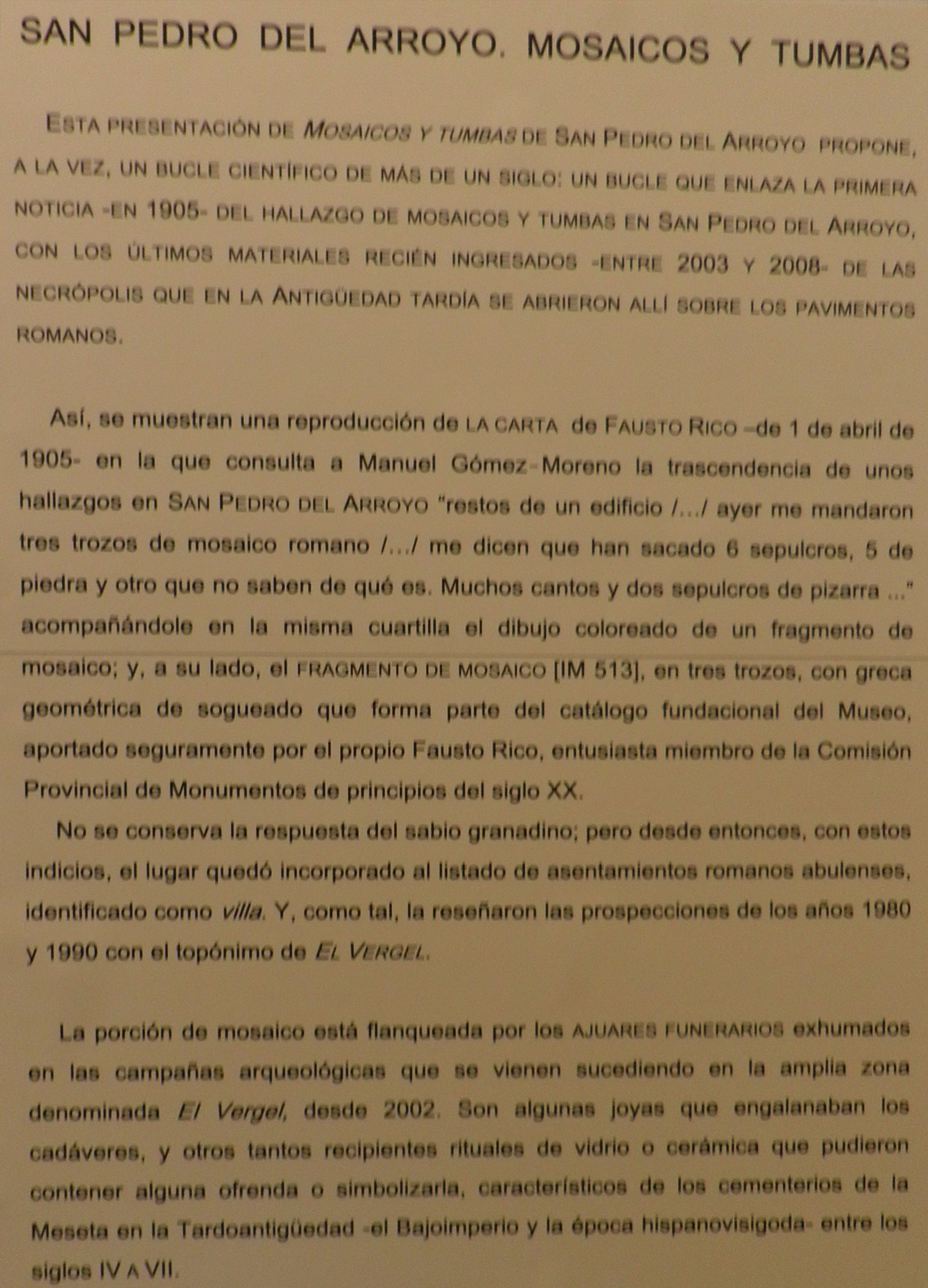 Cartel explicativo de la exposición de piezas de la villa romana de El Vergel y su entorno